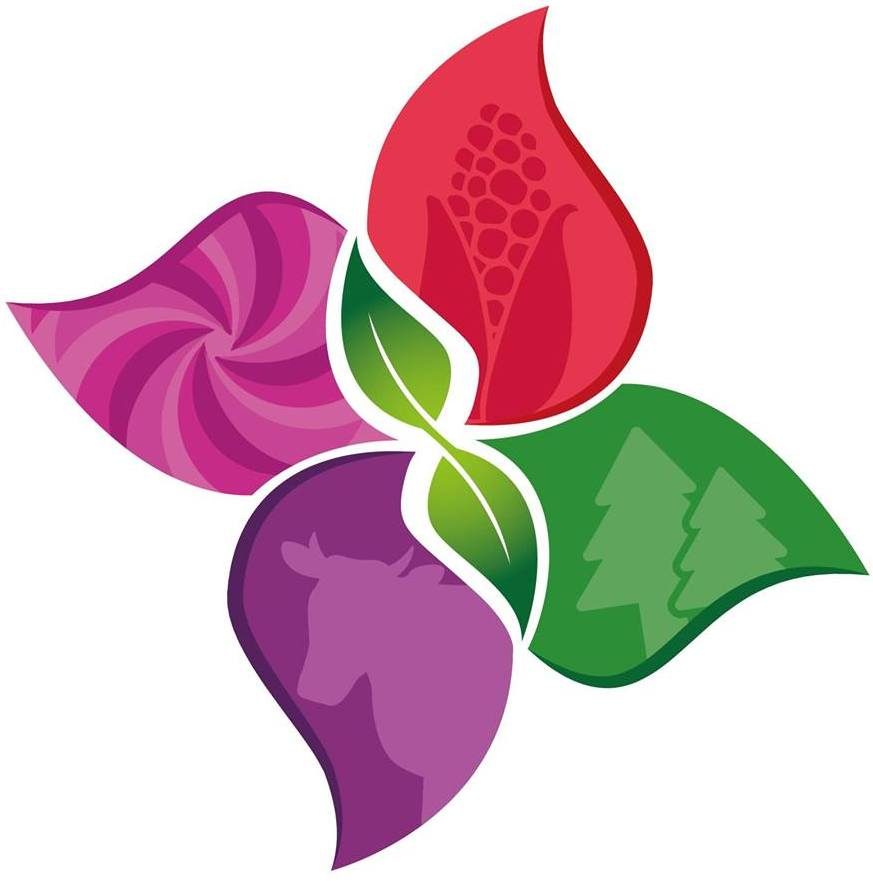 Escudo del gobierno de Tlaxco 2017-2021